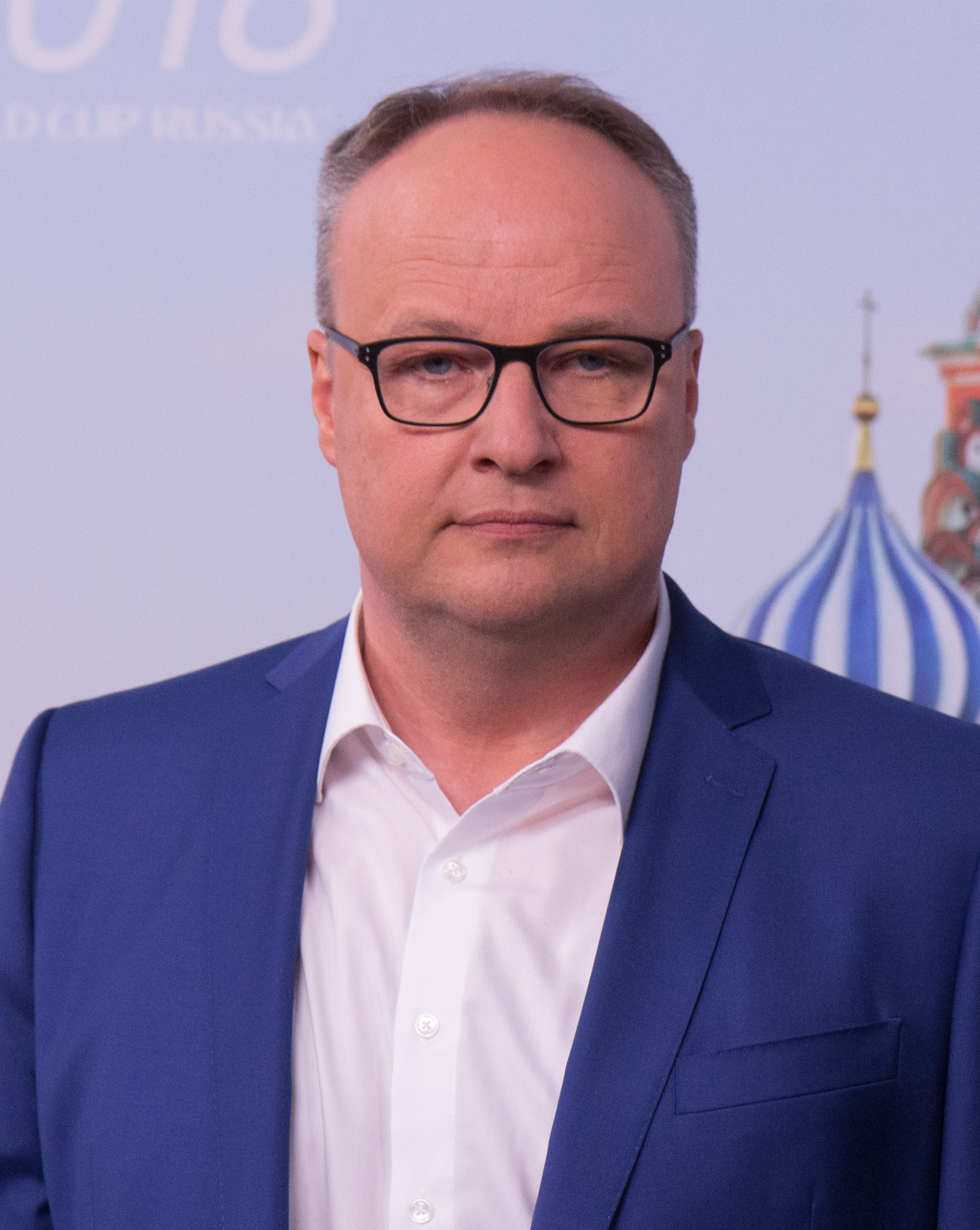 Oliver Welke auf der Pressekonferenz von ARD und ZDF zur Fussball WM 2018 in Russland.